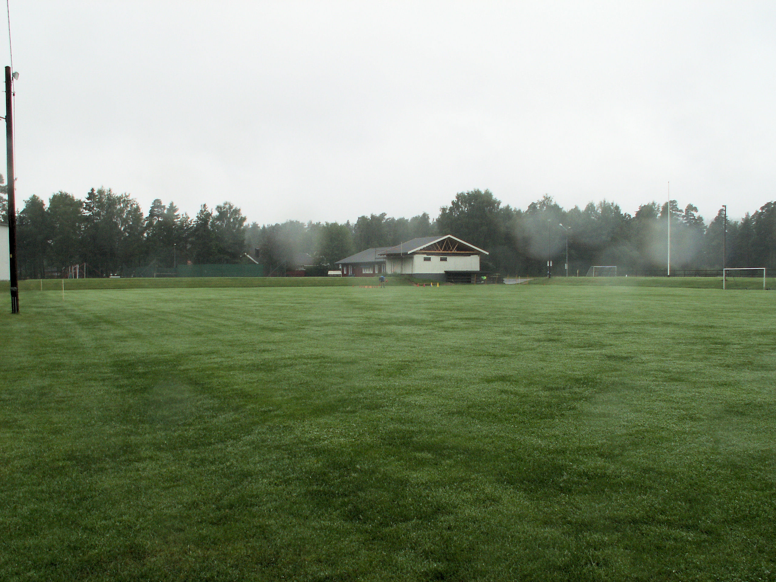 B-plan på isamon med paviljongen i bakrunden.